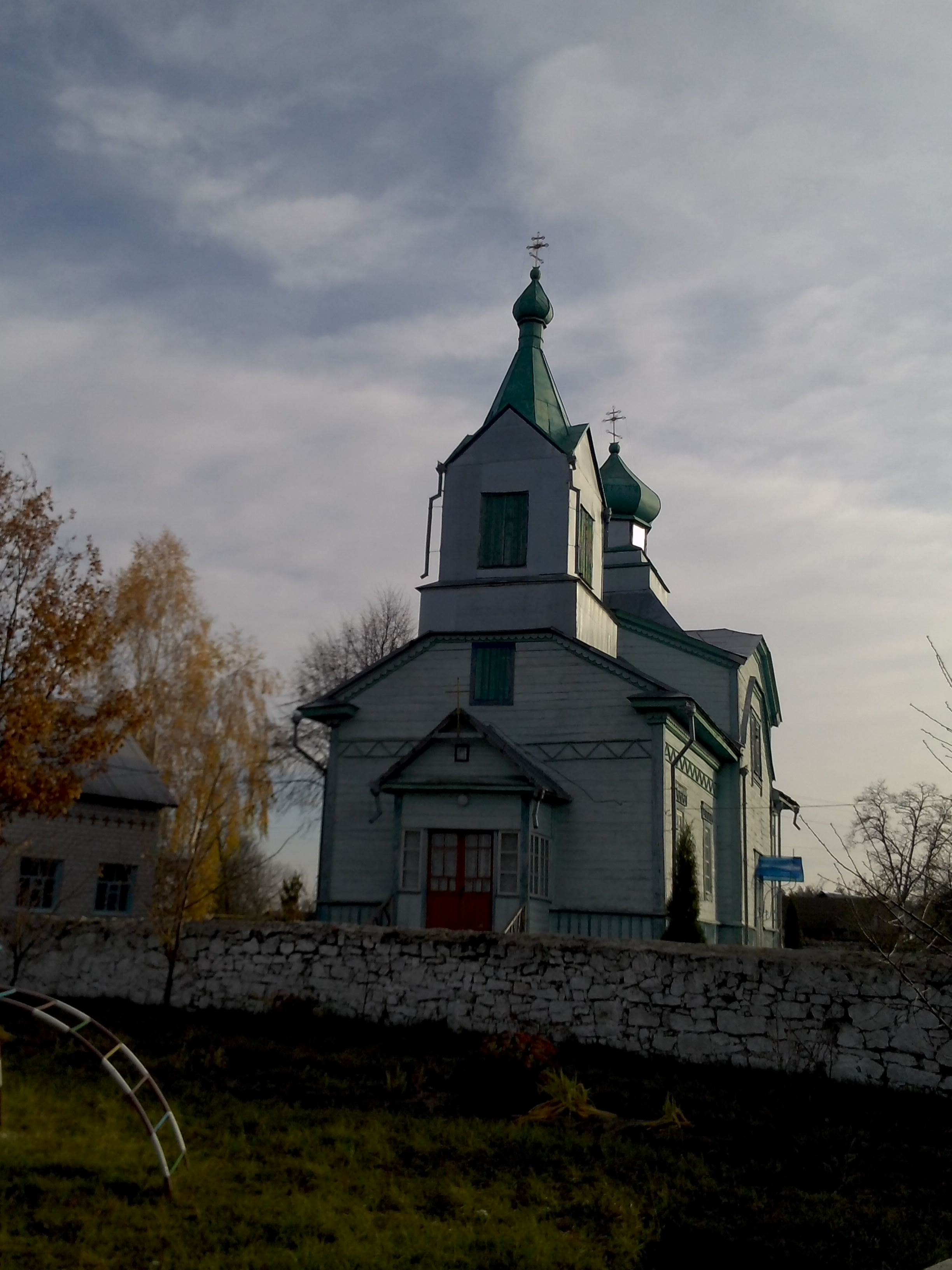 с. Сиваківці. Церква